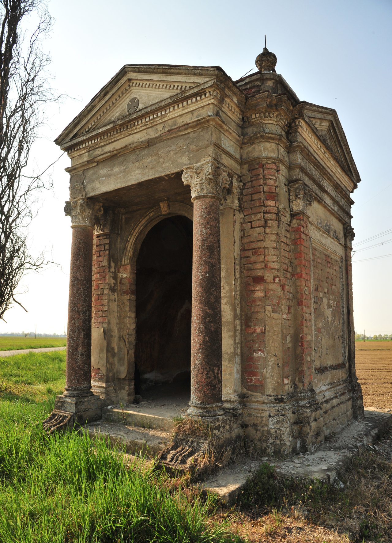 Rio Mezzano Paullo1